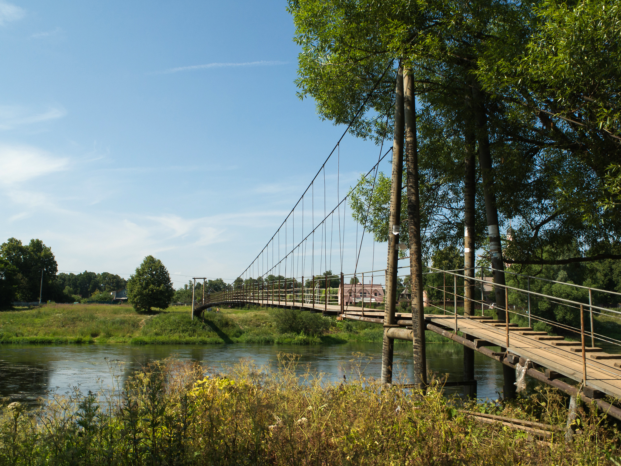 Подвесной мост через реку Москву, соединяющий посёлок Санатория им. Герцена и Васильевское